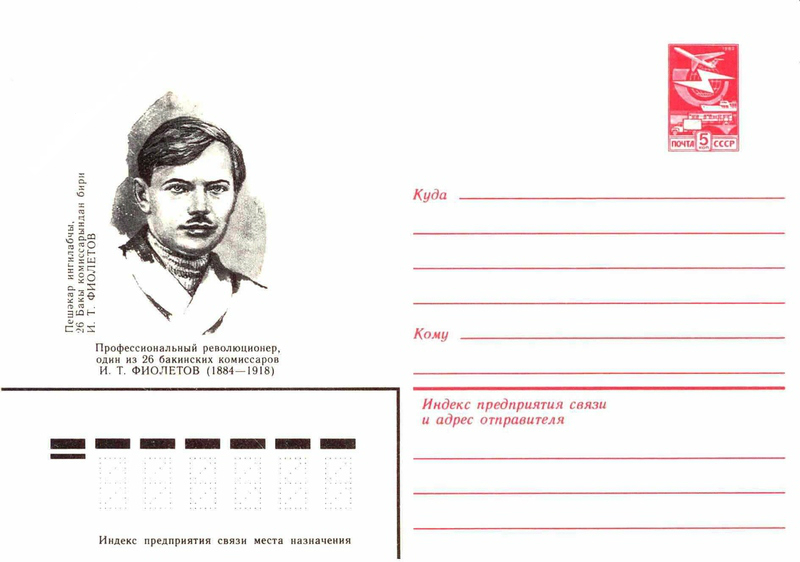 Художественные маркированные конверты 1984 года.